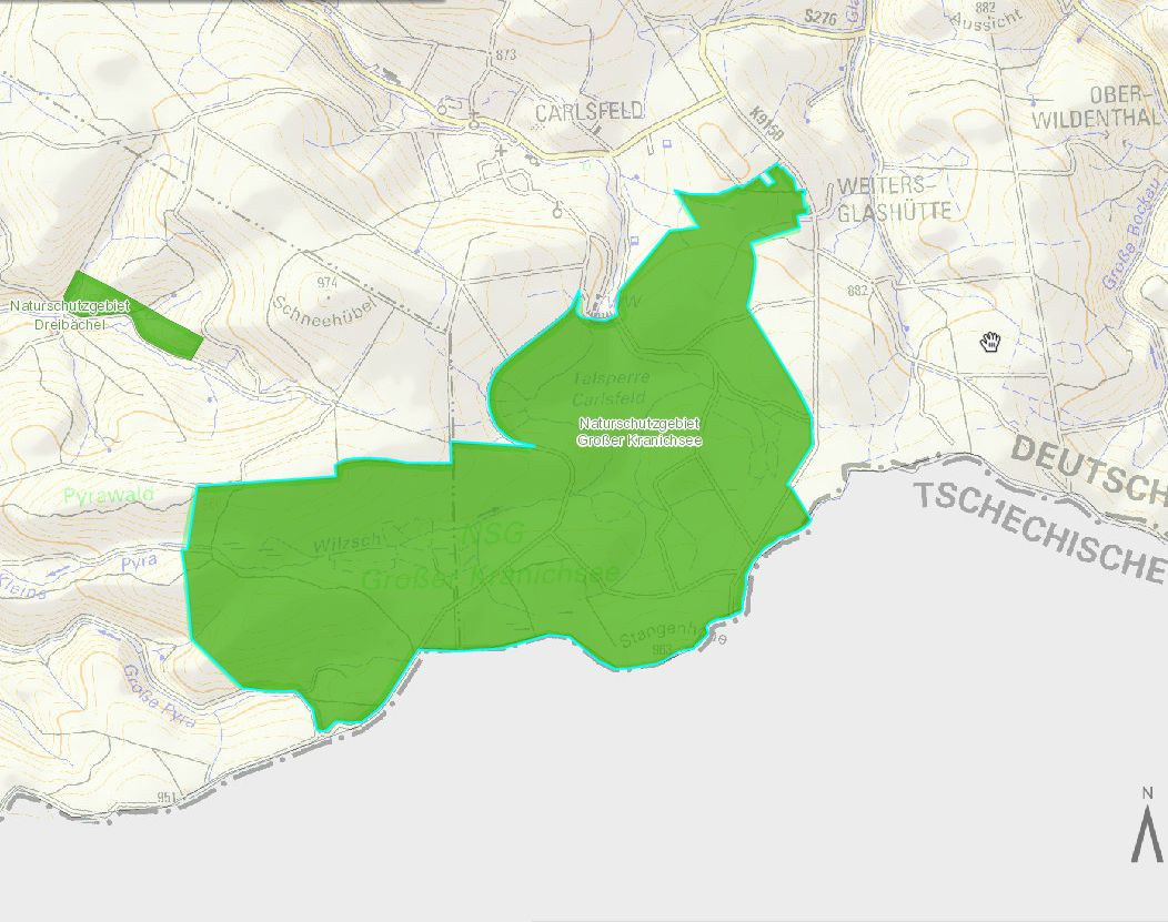 Carlsfeld: Das Naturschutzgebiet „Großer Kranichsee“ hat eine Fläche von 611 Hektar und wurde im Jahr 1961 ausgewiesen. Hier in einer Kartendarstellung im Maßstab 1:25.000 des Bundesamts für Naturschutz [1], abgerufen am 13. September 2015 Trotz der Abdeckung mit grüner Farbe ist zu sehen, dass die Wilzsch und die Große Pyra im Großen Kranichsee entspringen.